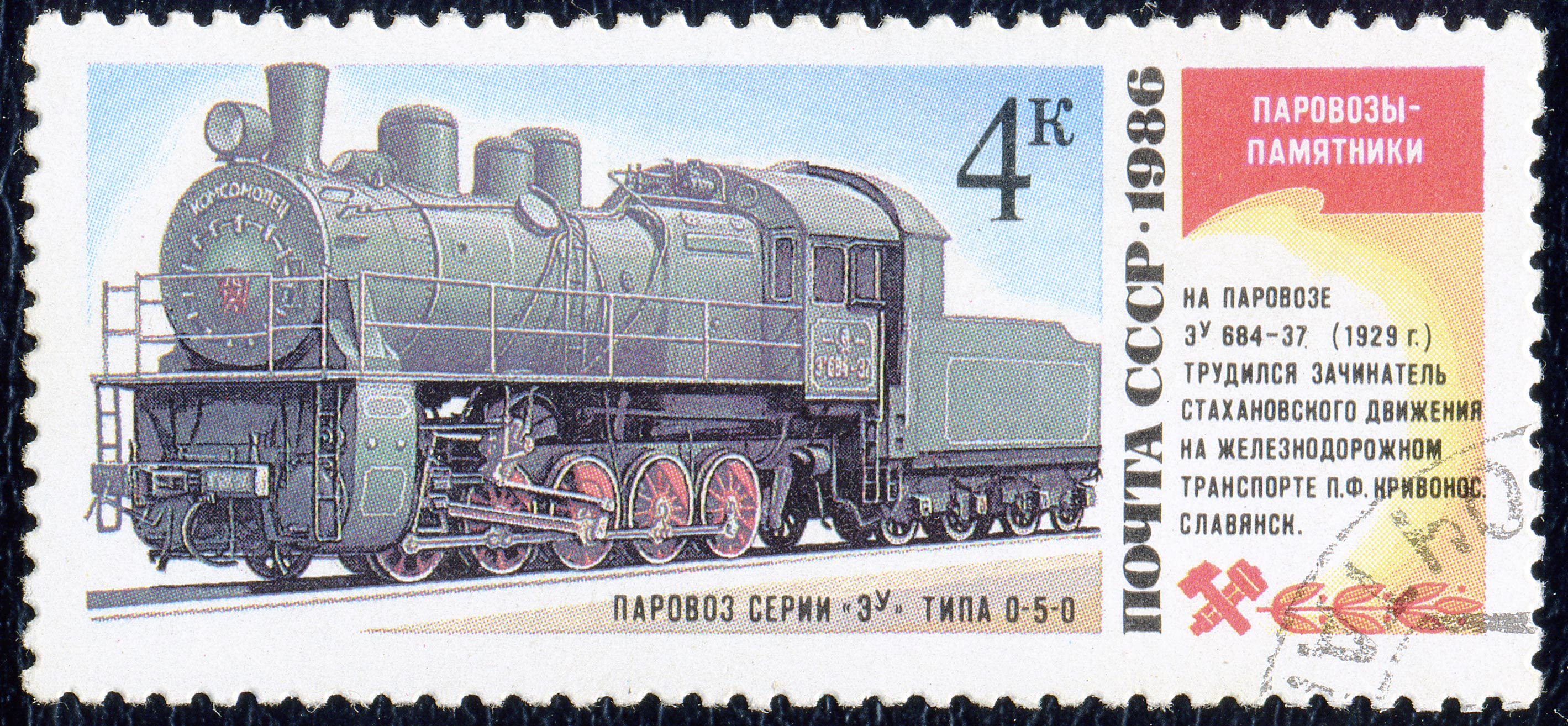 Почтовая марка СССР. 1986. Серия «Паровозы-памятники». Славянск. Паровоз серии Эу типа 0-5-0. На паровозе Эу 684-37 трудился Пётр Фёдорович Кривонос — зачинатель стахановского движения на железнодорожном транспорте